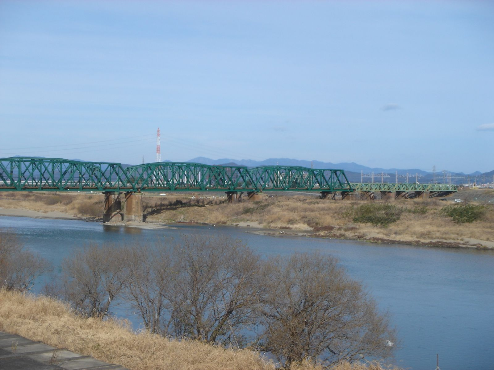 長良川橋梁(東海道線)、岐阜県瑞穂市で右岸下流より撮影。